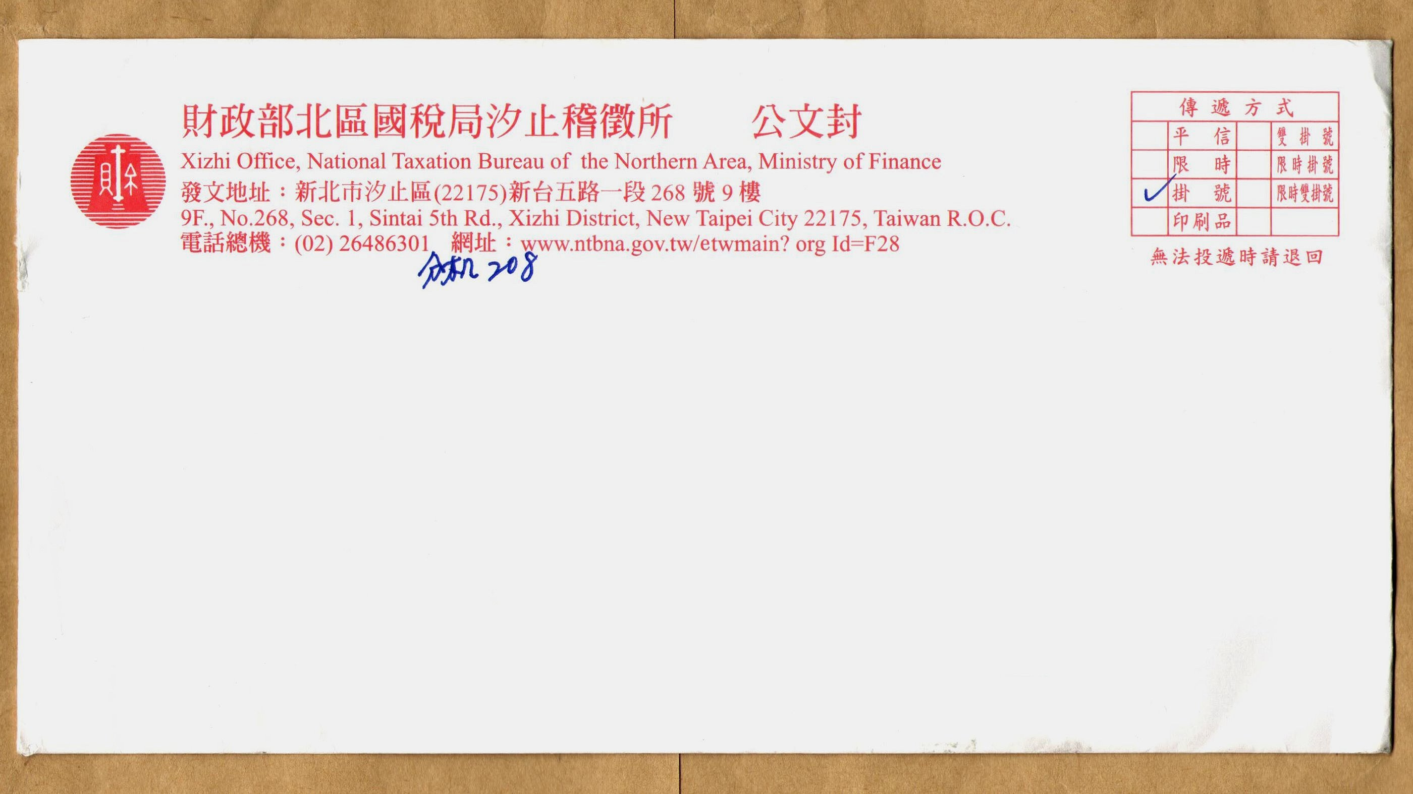 中文（台灣）: 中華民國財政部北區國稅局汐止稽徵所公文封正面。